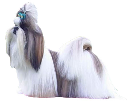 Shih tzu sur fond blanc